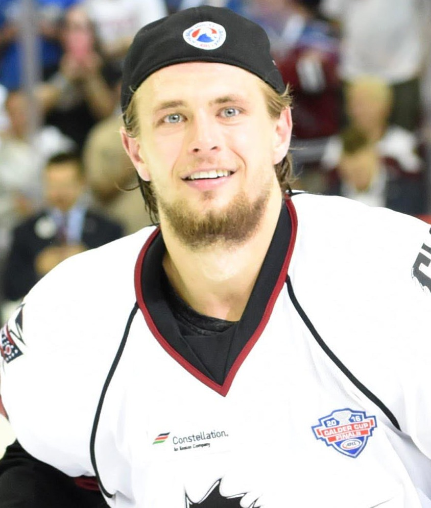 Photo: John Saraya/AHL